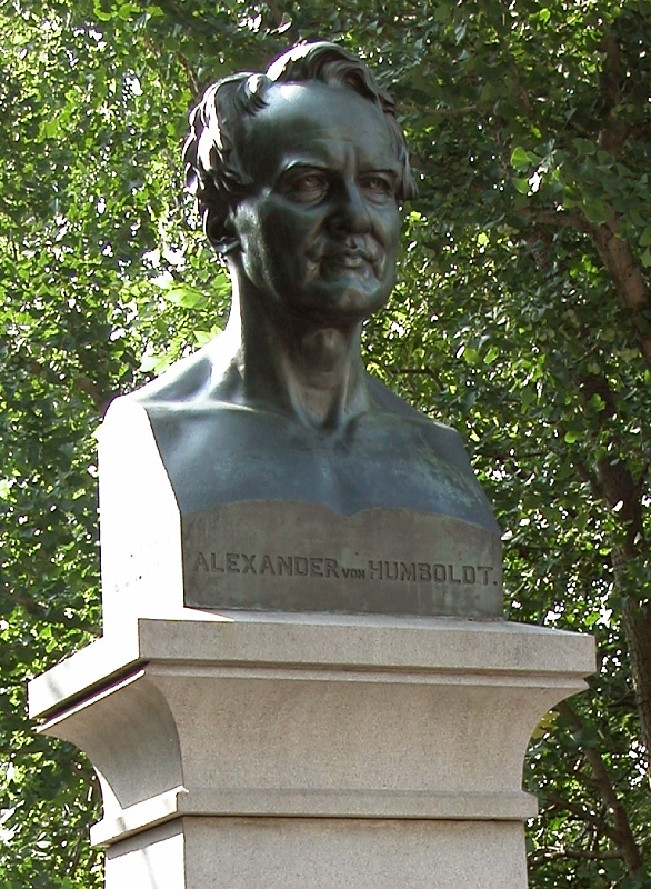 Denkmal zu Ehren von Alexander von Humboldt, Memorial, Central Park, New York, USA. (Bildhauer: Gustav Blaeser (Entwurf), Georg Ferdinand Howaldt (Guss))